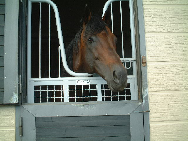 日高スタリオンステーションで撮影。